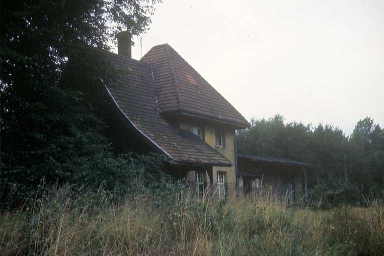 Bahnhof Rosenthal 1983 * Quelle: Sammlung B.Dohmen, Archiv-Nr. 9/30 * Fotograf: Benedikt Dohmen, User:Benedictus * Copyright Status: GNU Freie Dokumentationslizenz